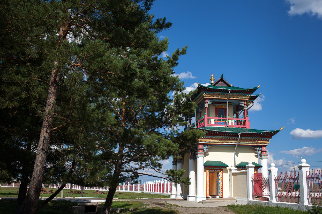 Комплекс дацан Агинский (Забайкальский край, Чита, 7 км от поселка)